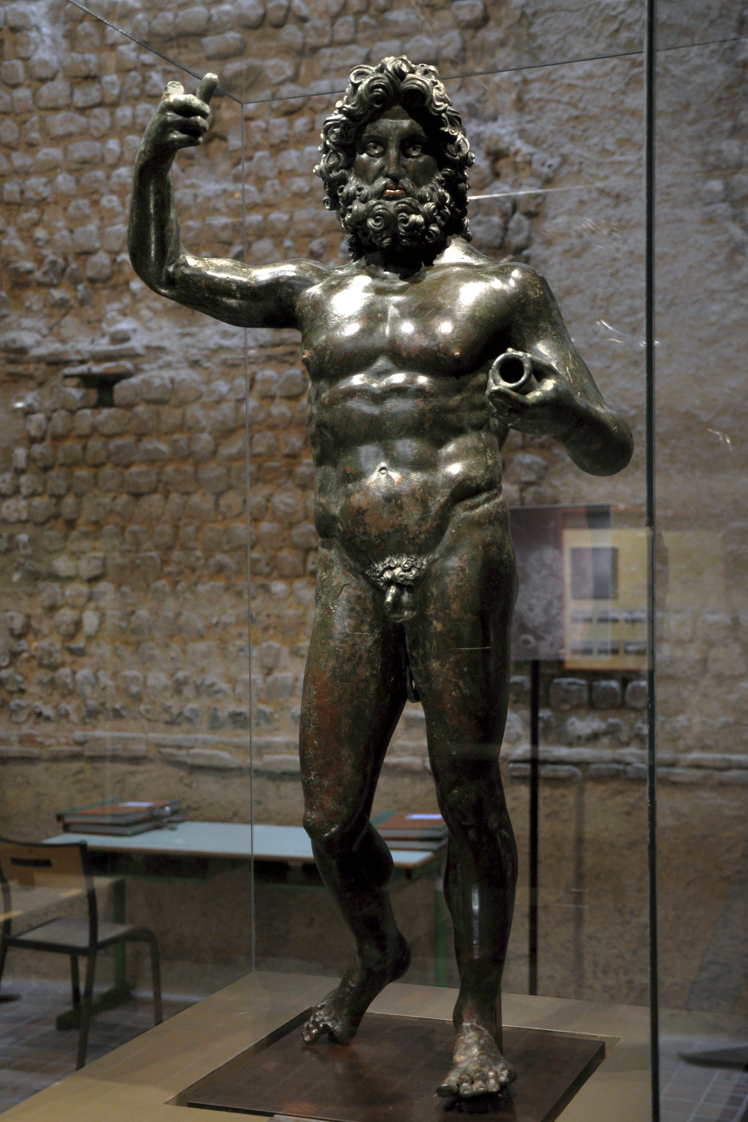 Statue de Jupiter (Jupiter Stator),trouvée au Vieil-Evreux en 1840, bronze, cuivre et argent, 2ème moitié du 1er siècle + JC. Musée d'Evreux.